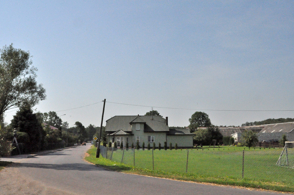 Droga we wsi